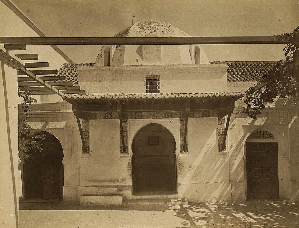 Alger. Le Tribunal arabe